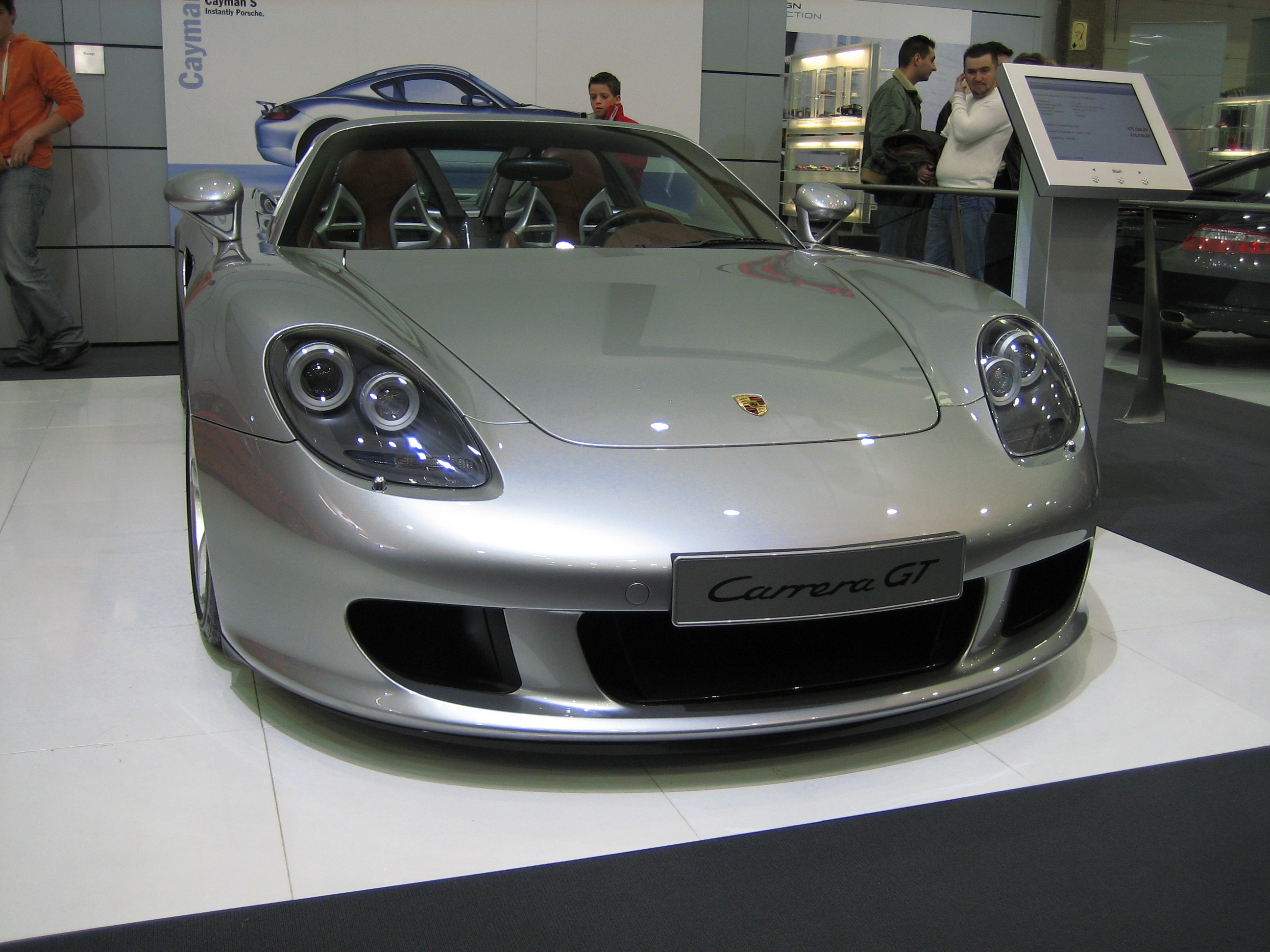 Porsche Carrera GT (Brussel 2006)